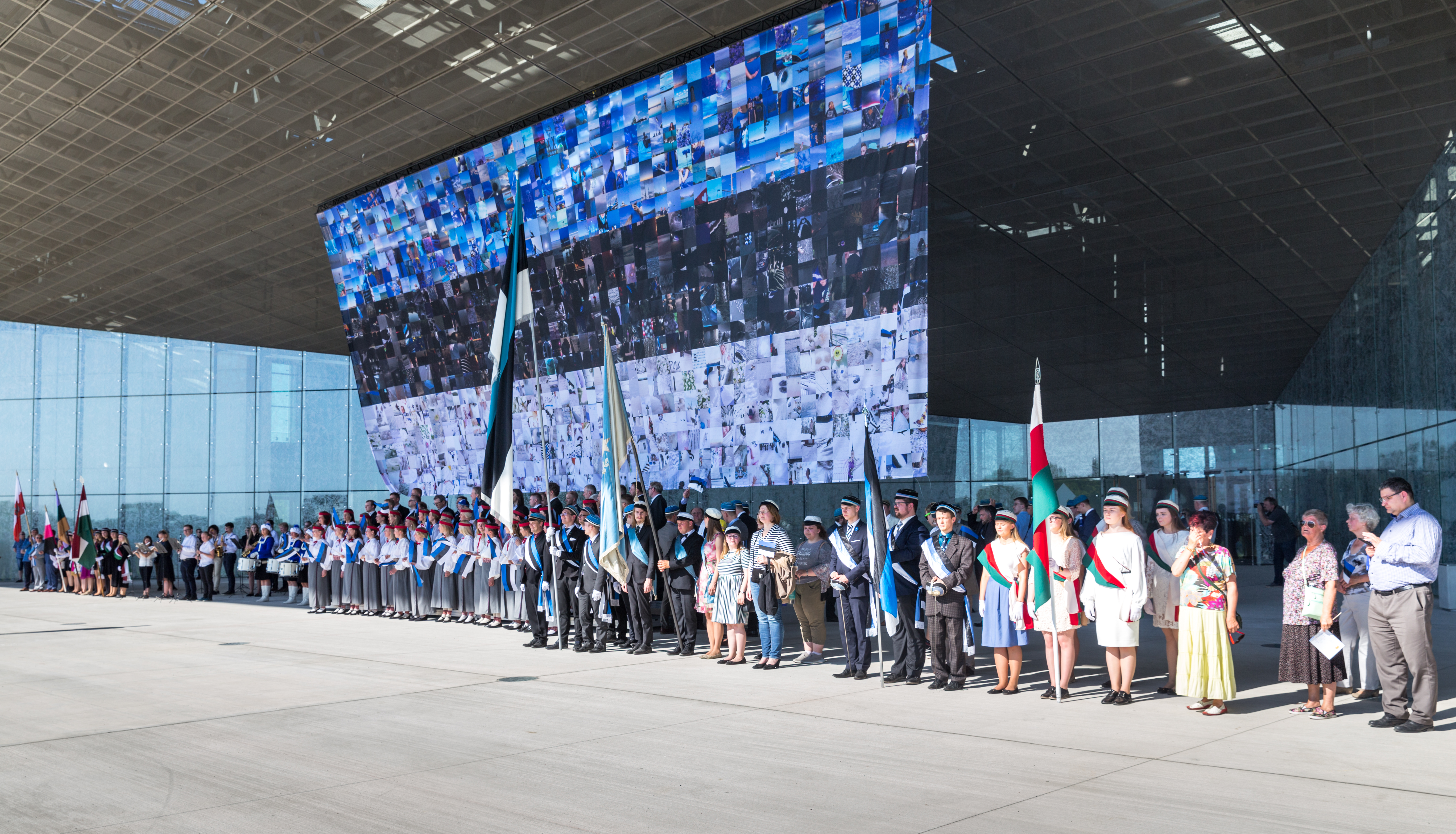 Eesti lipp 135 tähistamine Eesti Rahva Muuseumi juures